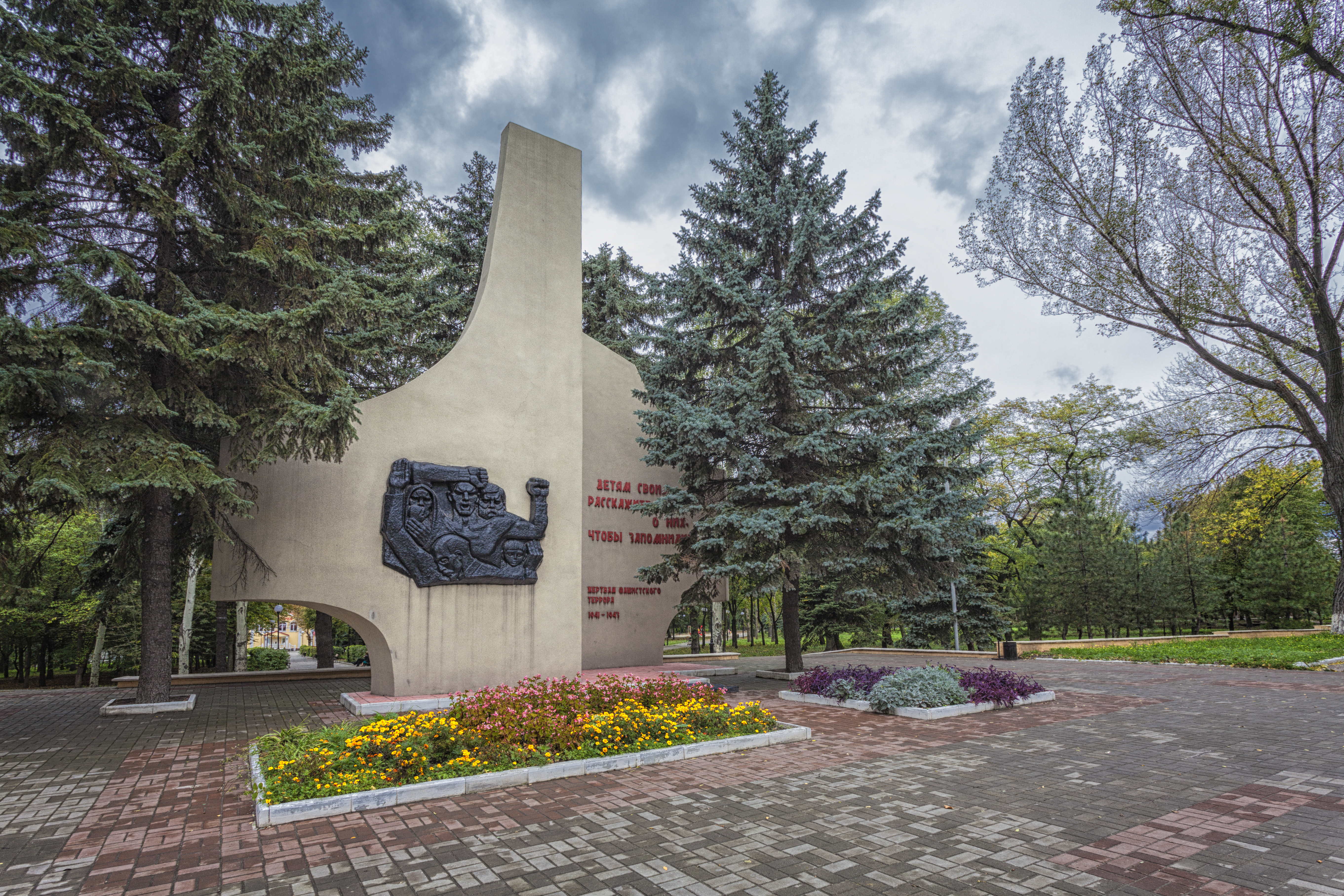 Пам'ятник жертвам фашизму., Макіївка, Центрально-Міський р-н, вул. Панченка.